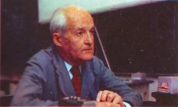 Luis Federico Leloir en 1982